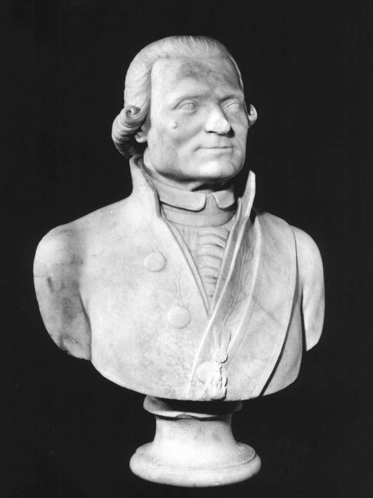 Busto di Melchiorre Cesarotti, opera di Romano Petrelli precedente al 1847. Il busto fa parte del Panteon Veneto, conservato presso Palazzo Loredan di Campo Santo Stefano a Venezia.